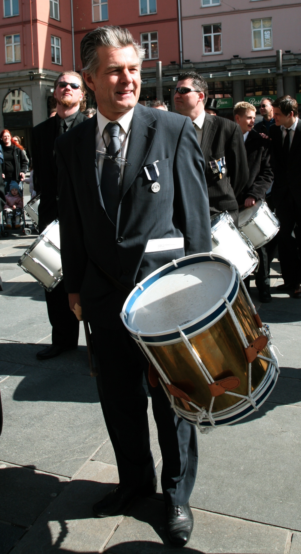 Lasse Lindtner, norsk skuespiller.